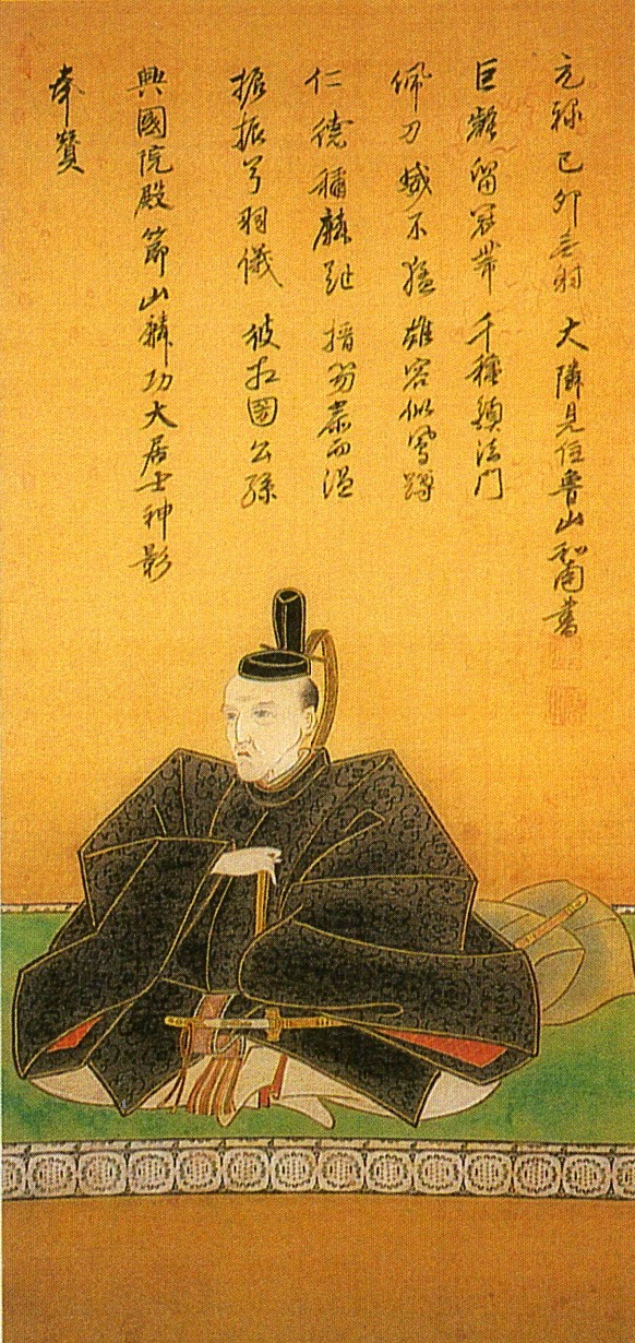 丹羽長次の肖像画(市指定文化財)。